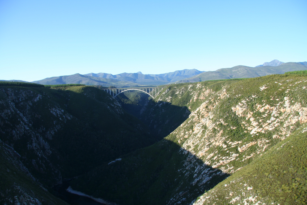 Helicopter view, Bloukrans Bridge